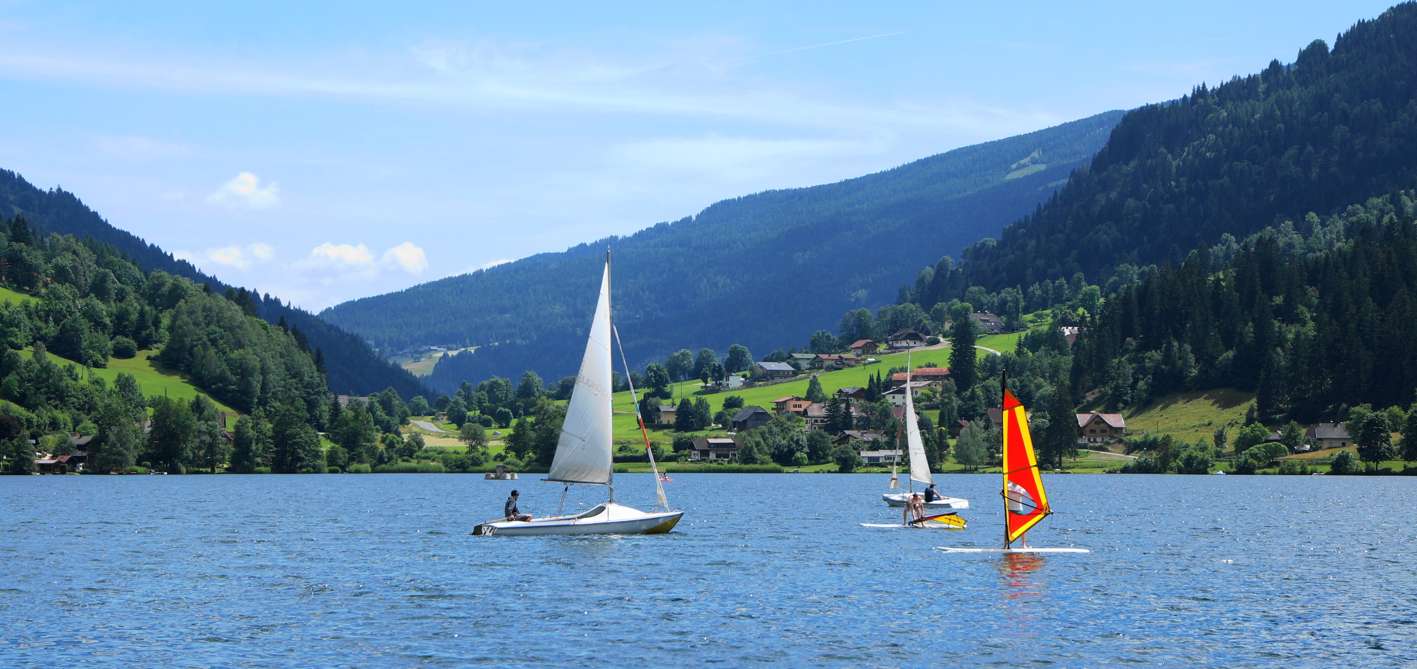 Der Brennsee im Gegendtal ist das Surfer- und Segeleldorado in Feld am See, Bezirk Villach Land